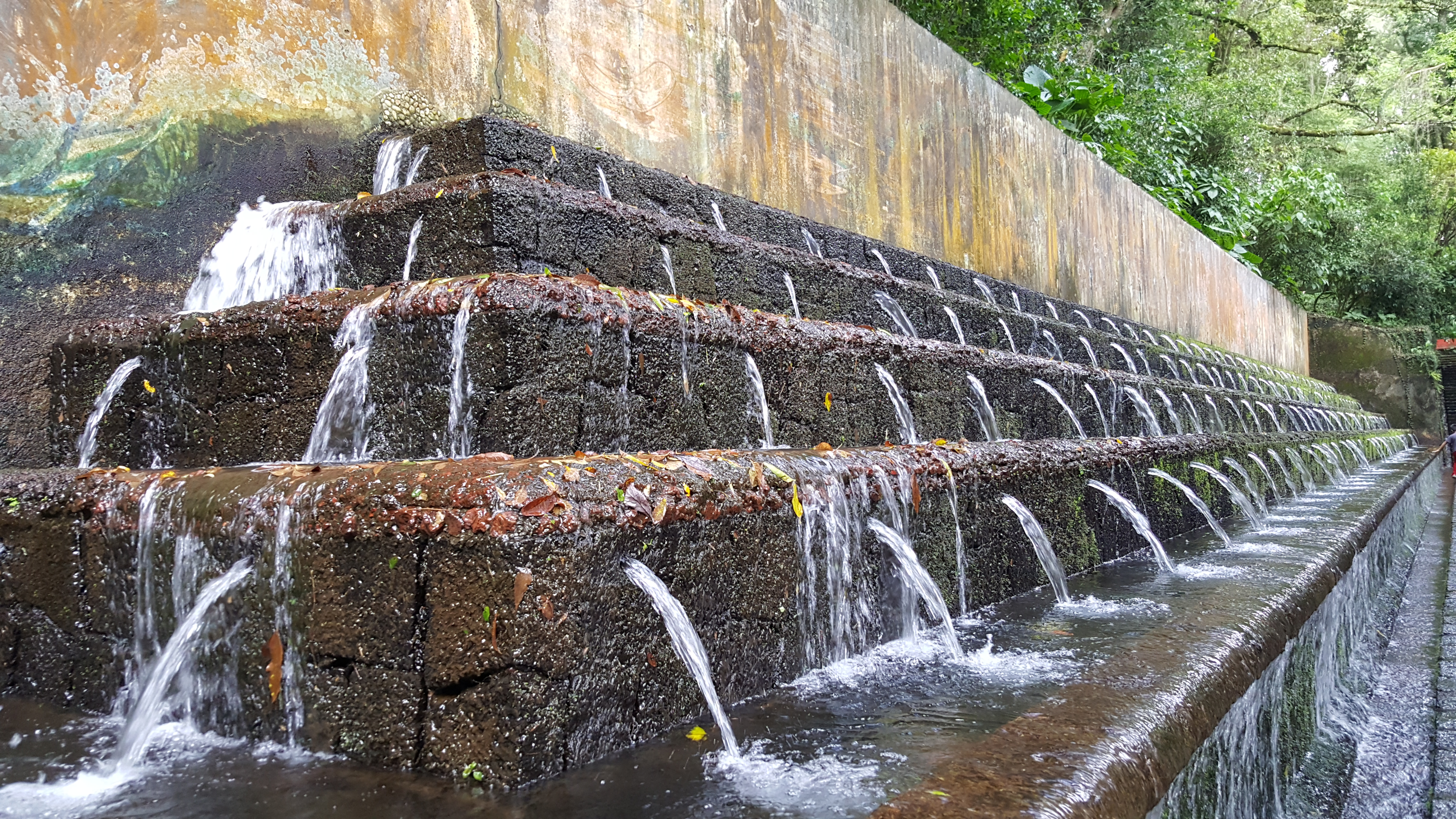 Fuente Escalonada Barranca del Cupatitzio